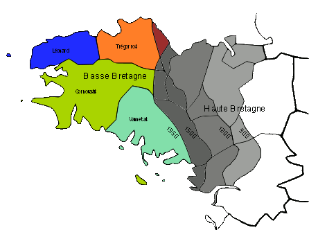 Dialectes du breton et leur recul à travers les siècles.